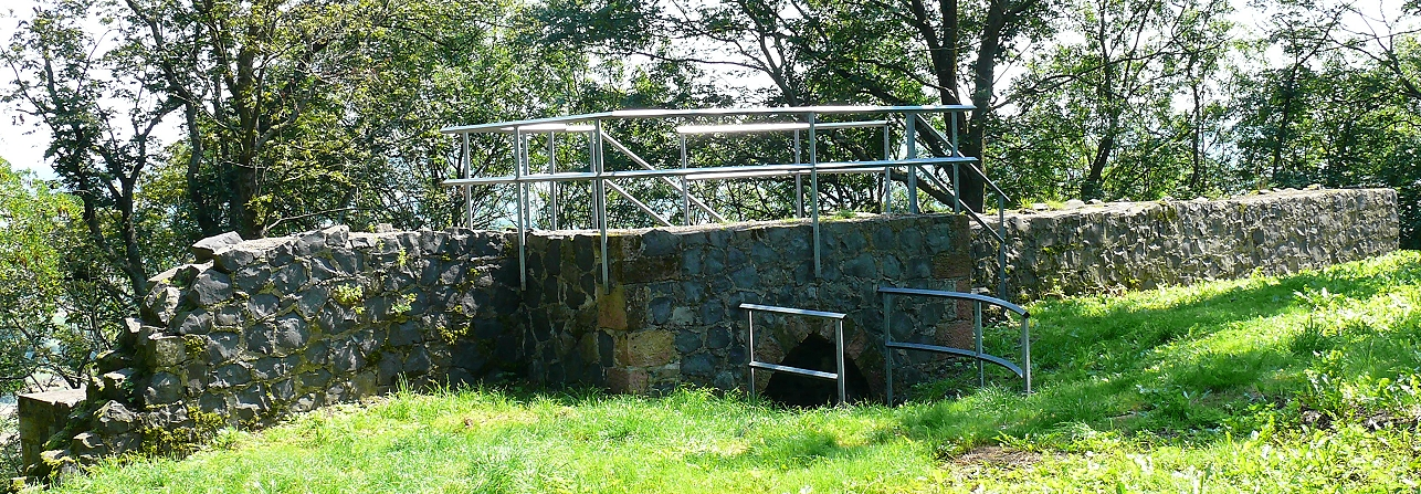 Burgruine Wenigenburg - Vorburg des Schlosses Amöneburg